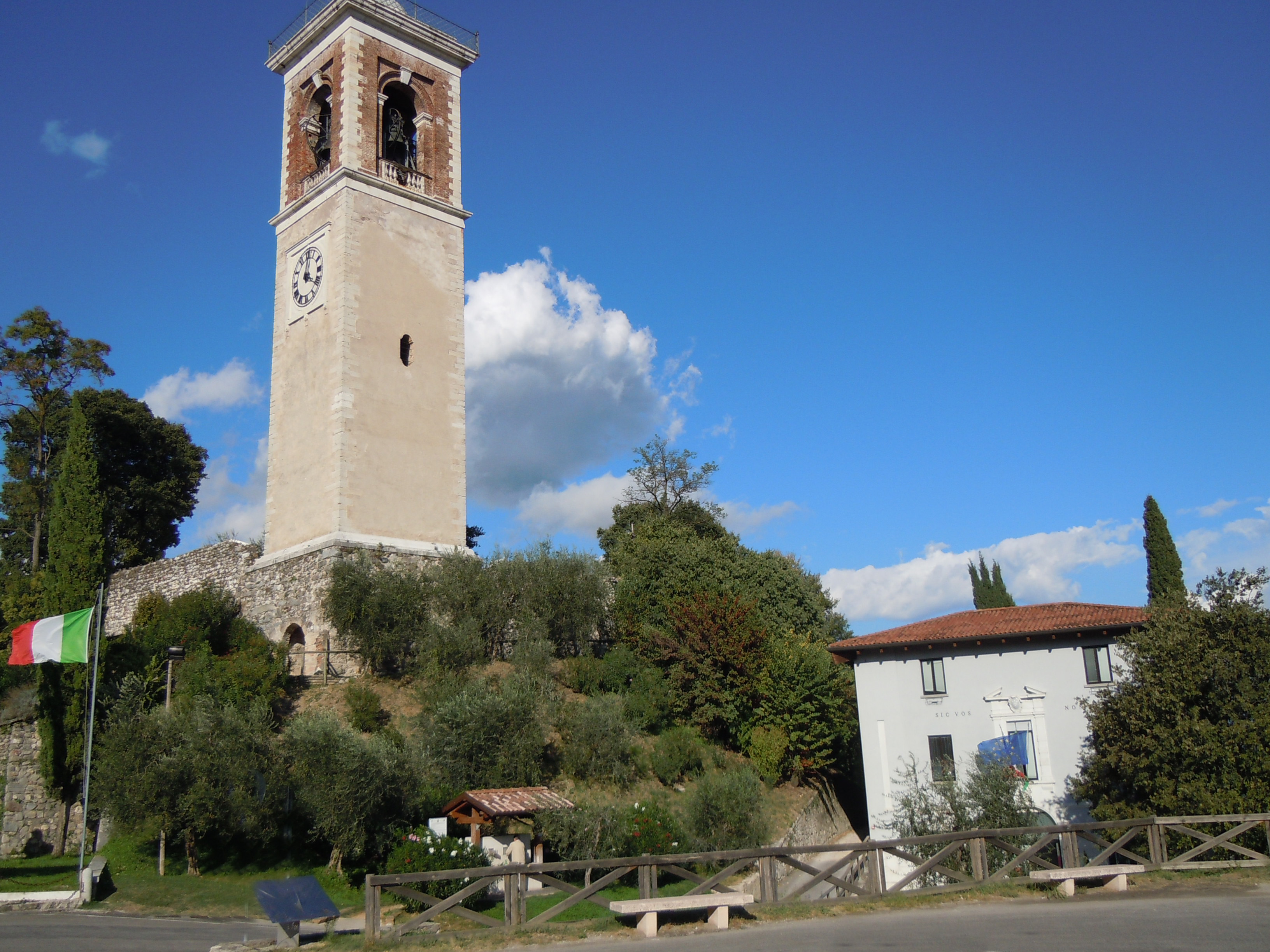 Puegnago, torre e municipio.